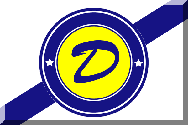 Dynamo Kyiv fantasy flag